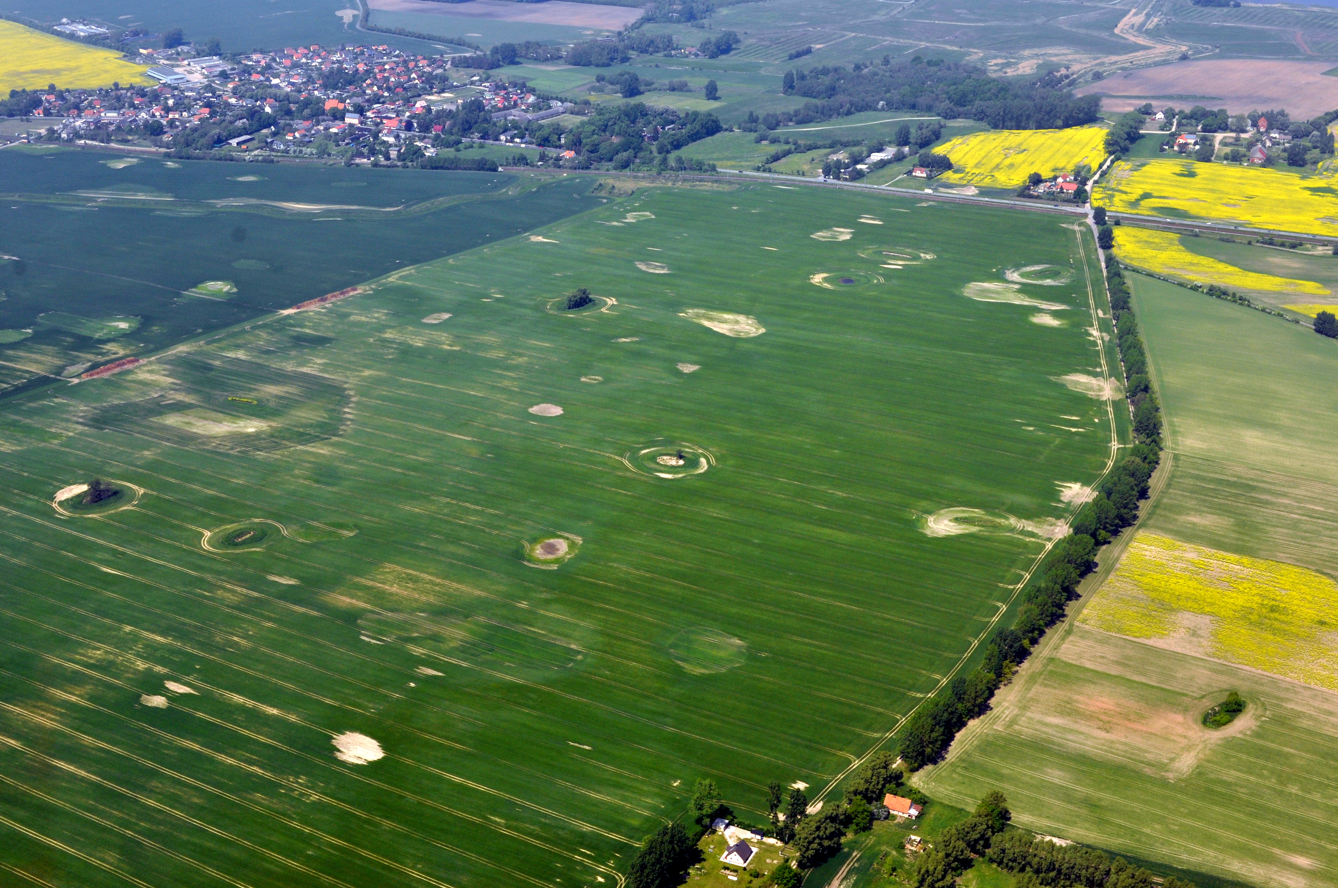 Die Bilder wurden von mir während eines einstündigen Rundflugs ab Flugplatz Güttin am 21. Mai 2011 aufgenommen. Die Bildbeschreibung steht im Dateinamen. Aufgenommen mit einer Nikon D5000 durch das Seitenfenster des Flugzeugs.